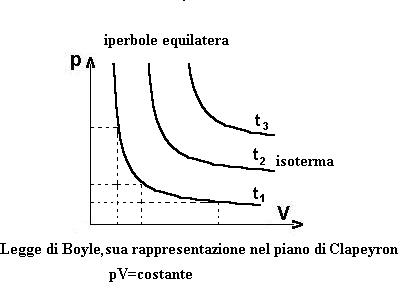 diagramma pressure volume per i gas perfetti, la legge di Boyle sul piano di Clapeyron